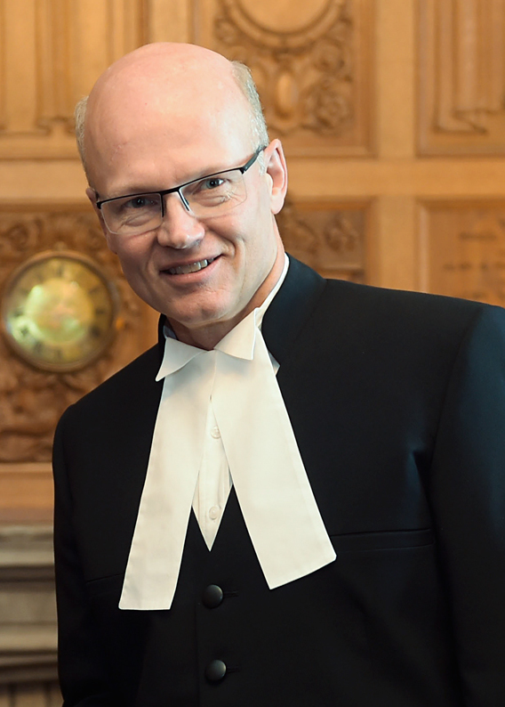 El Presidente Enrique Peña Nieto continúa la Visita de Estado a Canadá, acompañado por el Primer Ministro, Justin Trudeau. Ottawa, Canadá, 28 de junio de 2016.